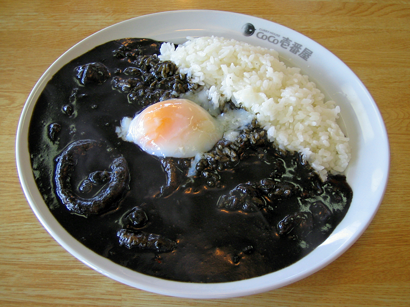 イカスミで真っ黒です。CoCo壱番屋「黒カレー」